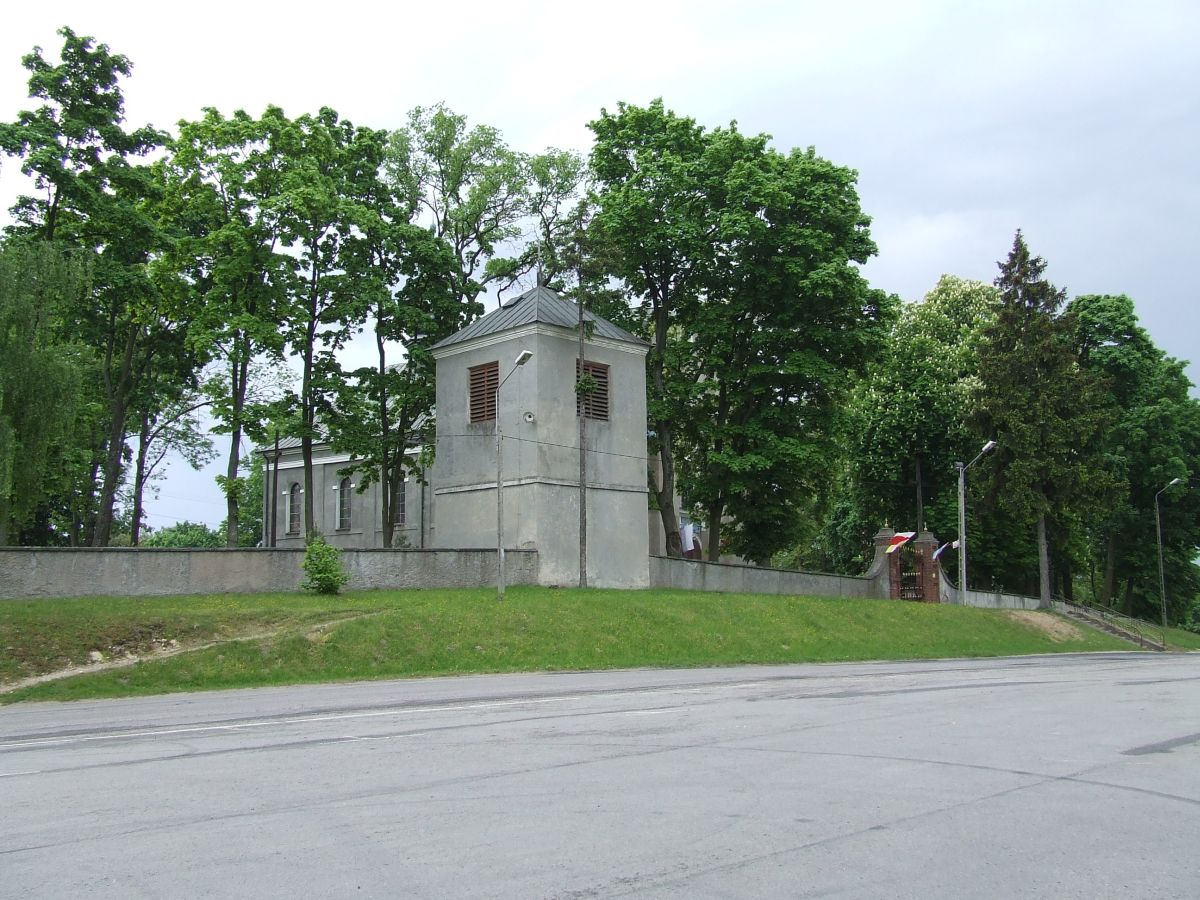 Church in Kowala (województwo mazowieckie)